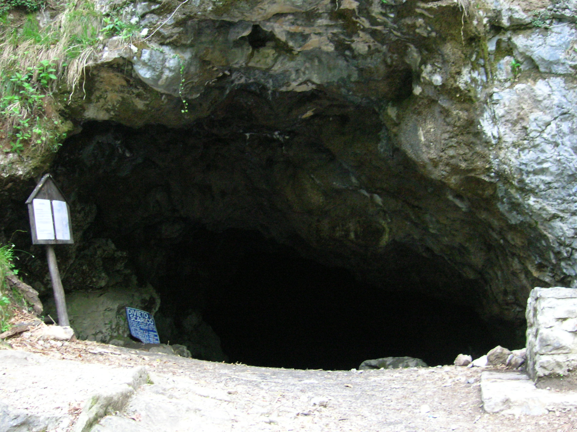 l'entrata della grotta Ferrera, in località Acqua Bianca a Mandello del Lario